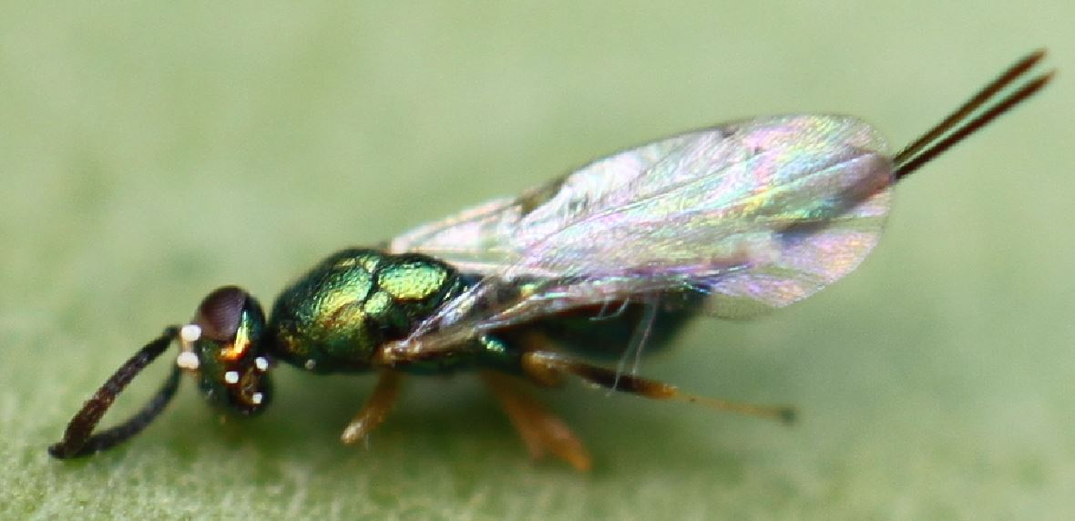 Erzwespe der Gattung Torymus, Parasitoid der Himbeergallmücke (Lasioptera rubi)